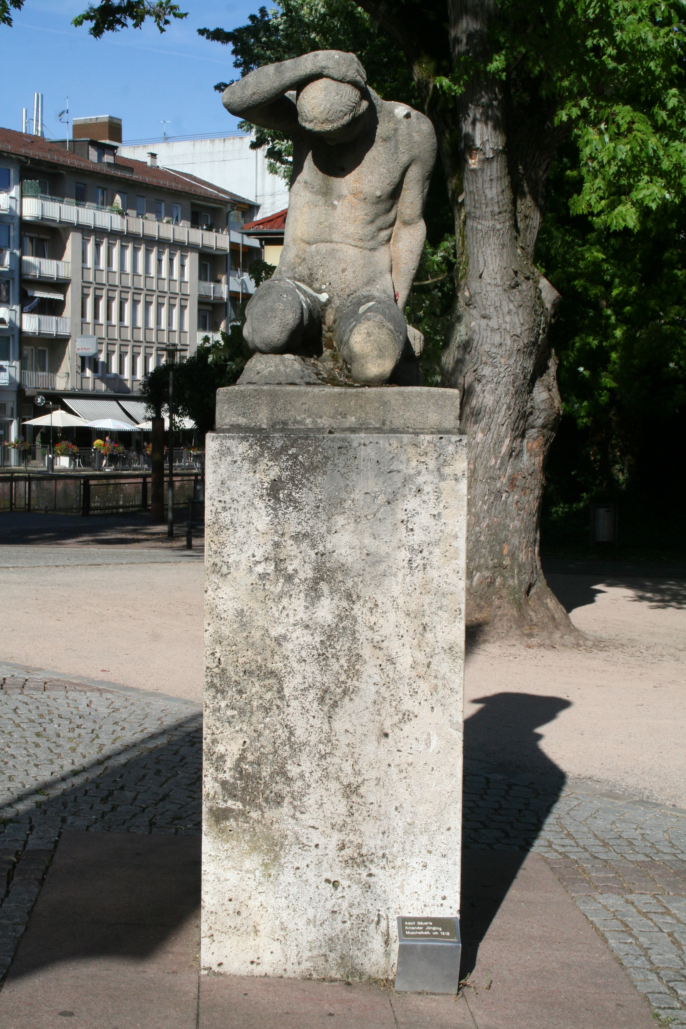 Pforzheim